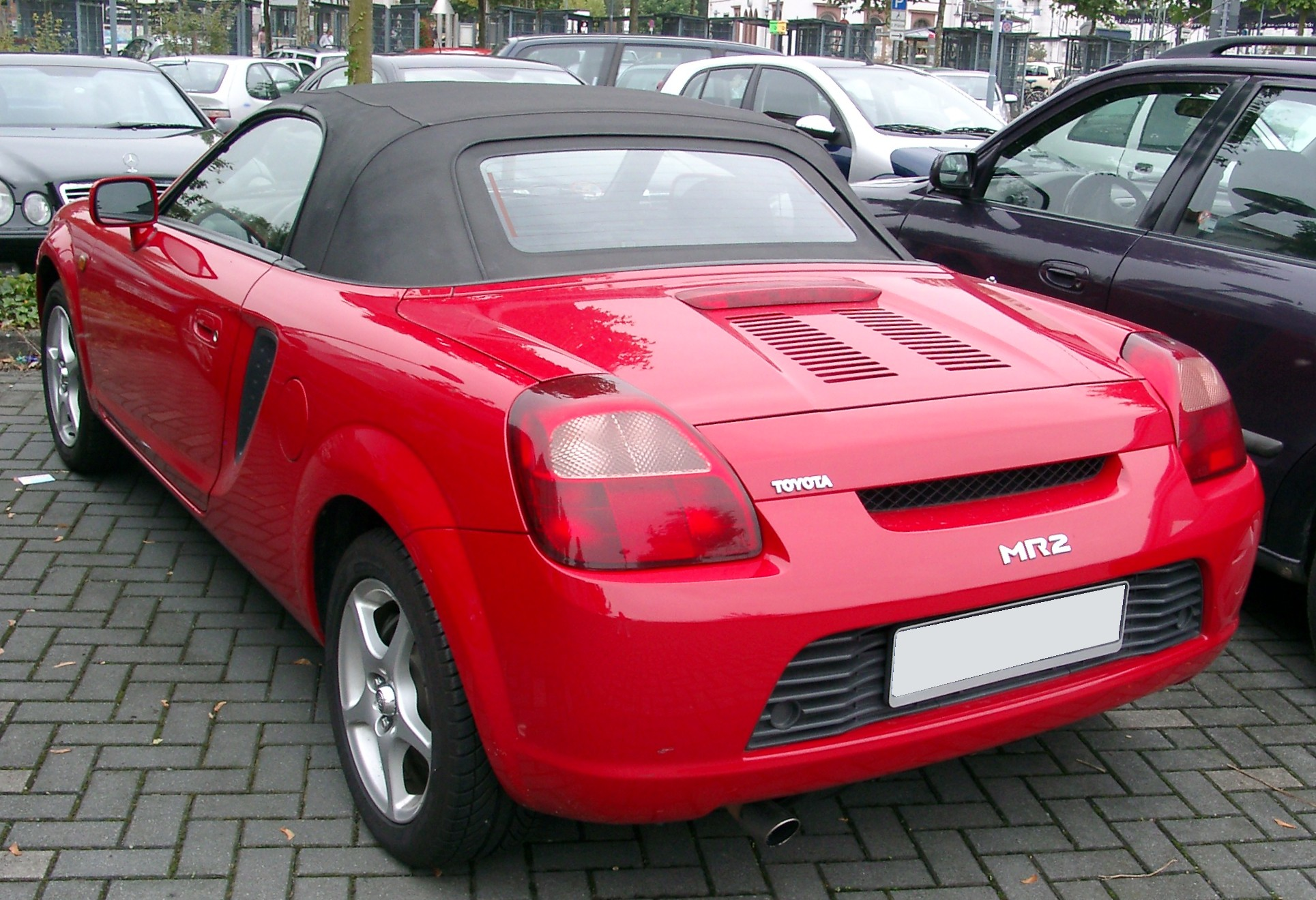 Toyota MR2 W3